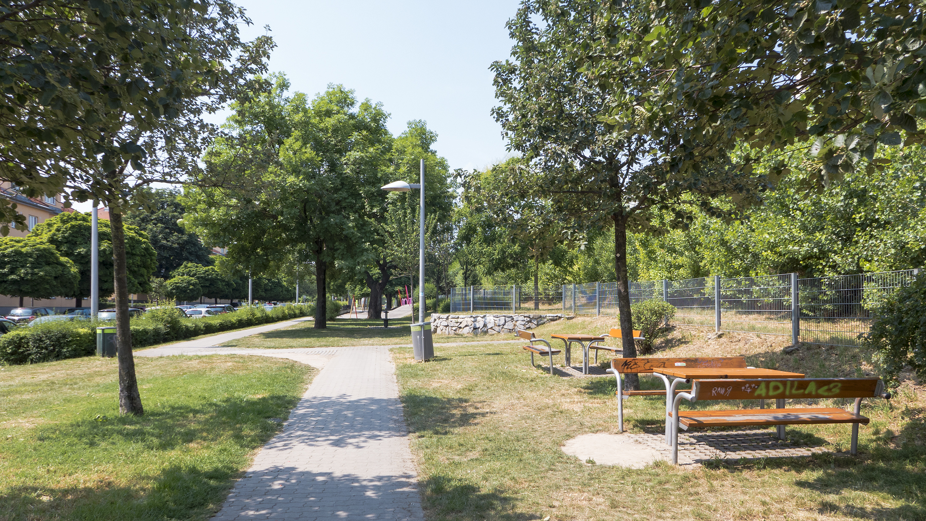 Haugerpark in Wien 11